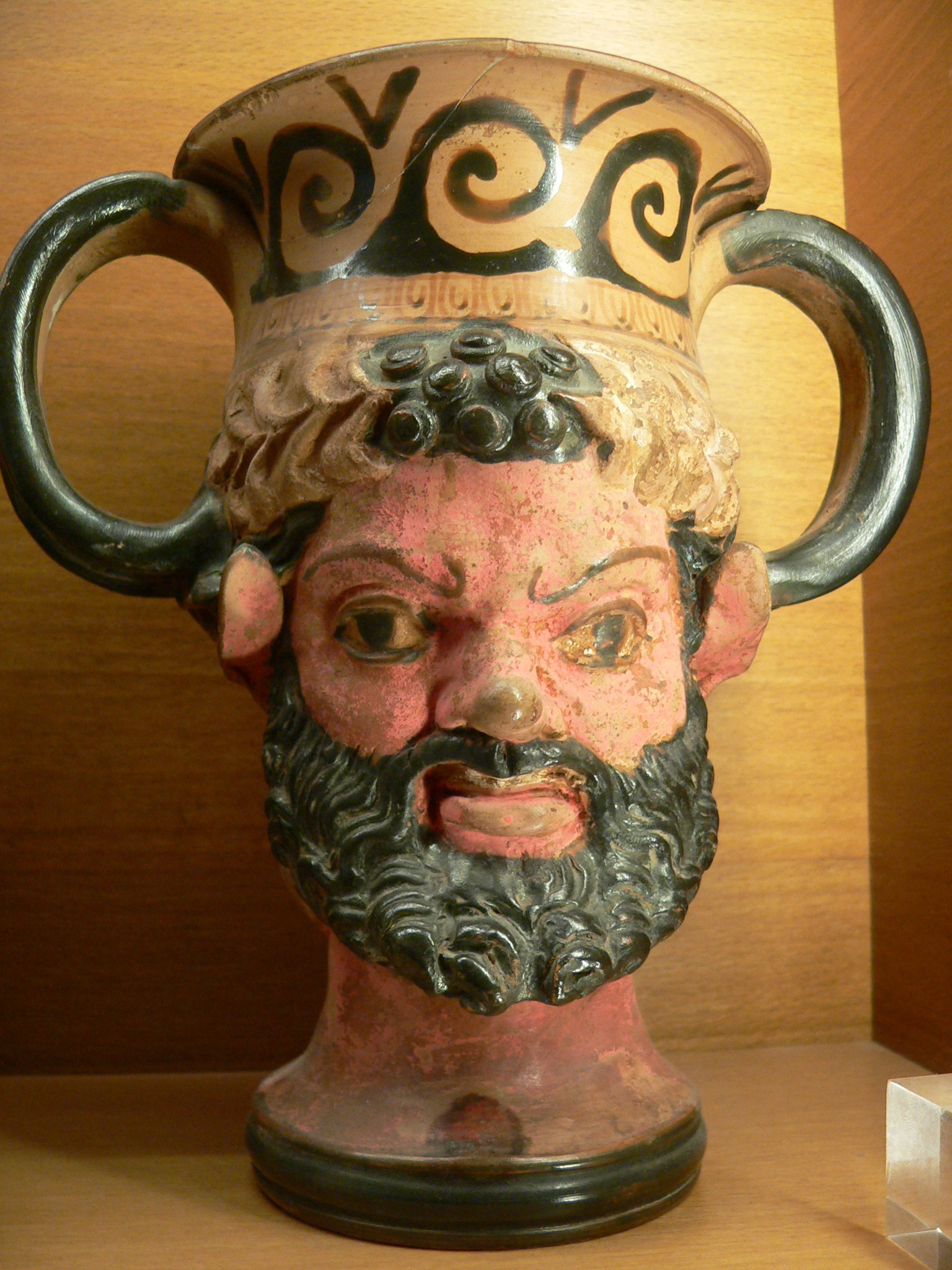 Canthare janiforme. Canthare plastique à double tête: tête de satyre (présentée ici) et tête féminine, groupe de Chiusi, 2ème moitié du IVe siècle av. J.-C., terre cuite.